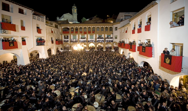 Medianoche del Jueves Santo, Plaza de la Villa de Híjar (Teruel). Romper la Hora